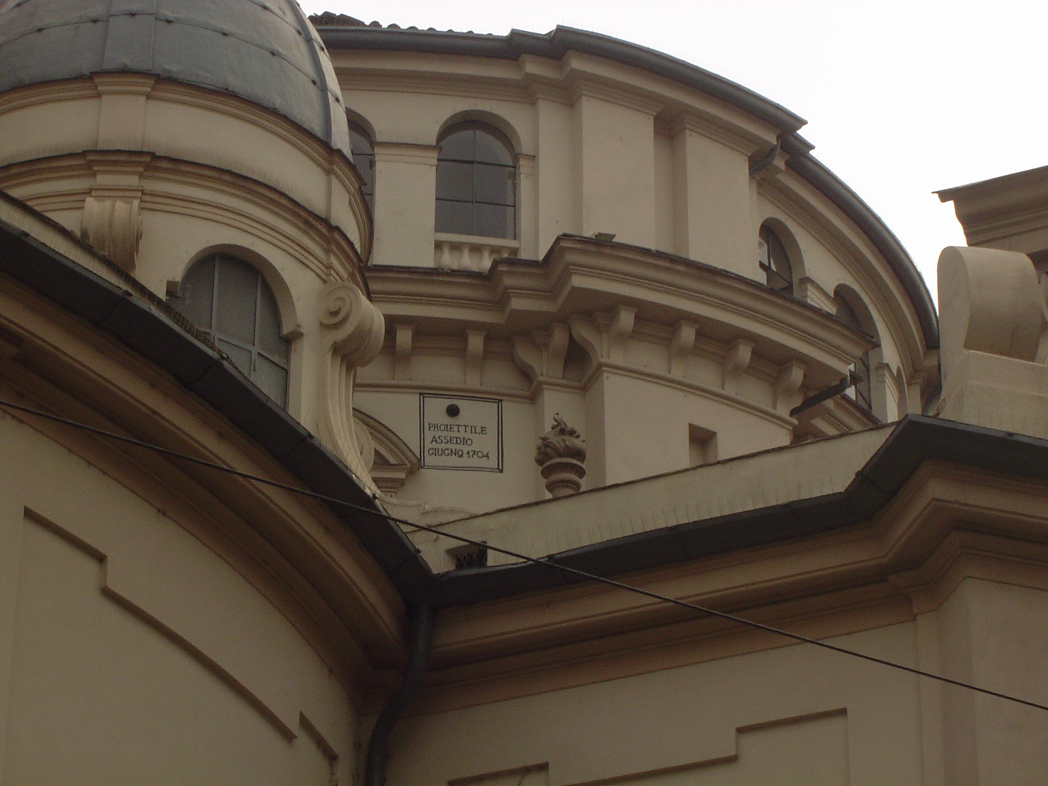 Mario Antonio Rossi, Autore, Lapide commemorativa dell'Assedio di Torino che riporta erroneamente la data 1704 al posto di 1706.